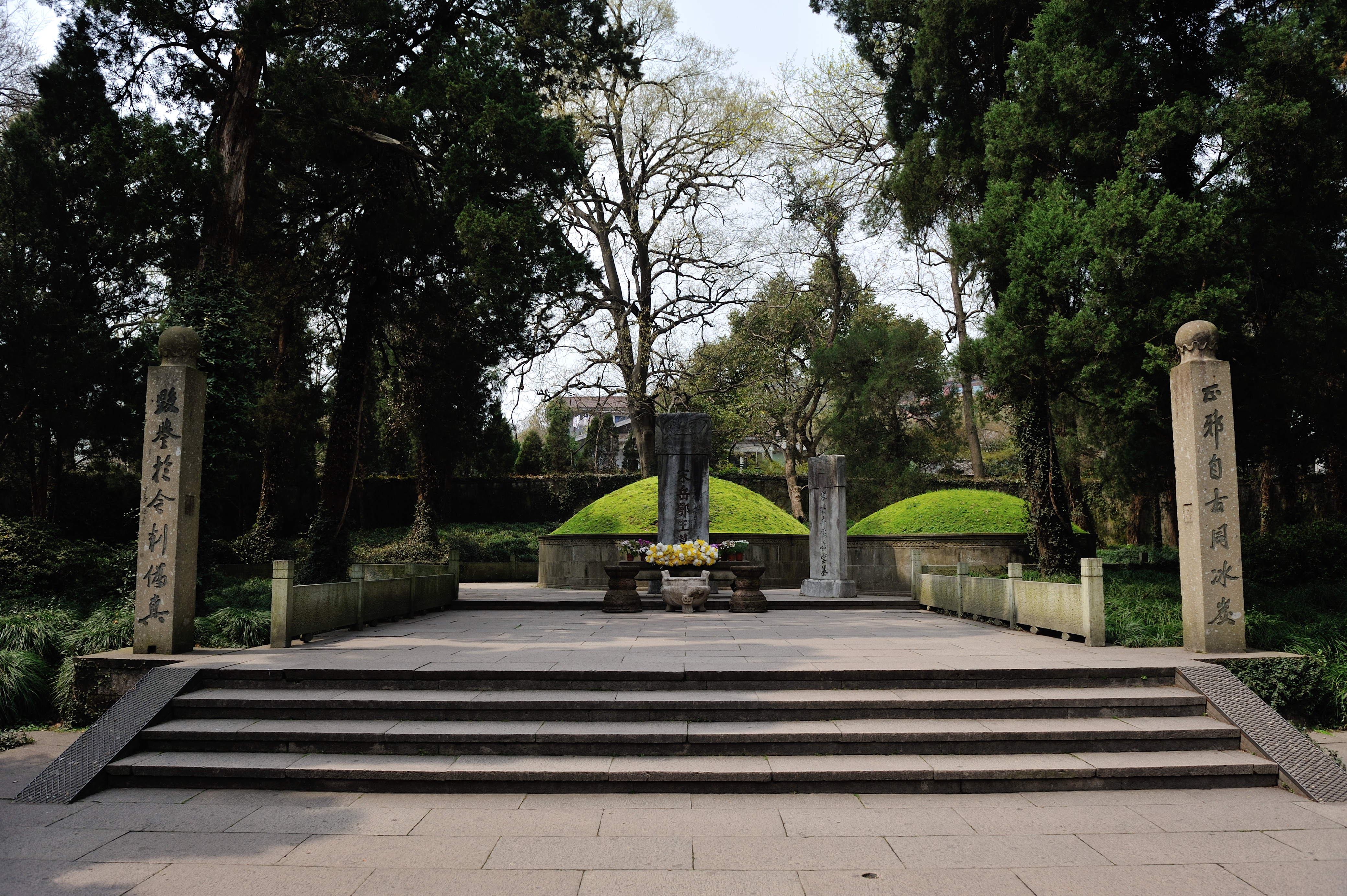 杭州岳王庙